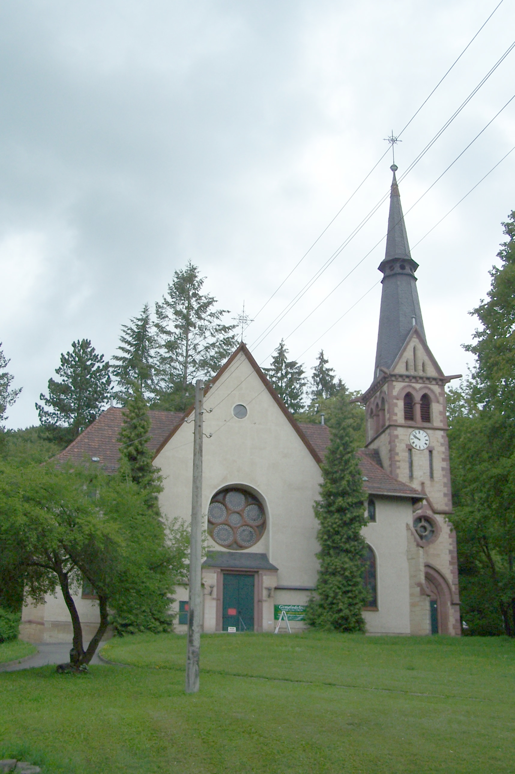 Bad Liebenstein